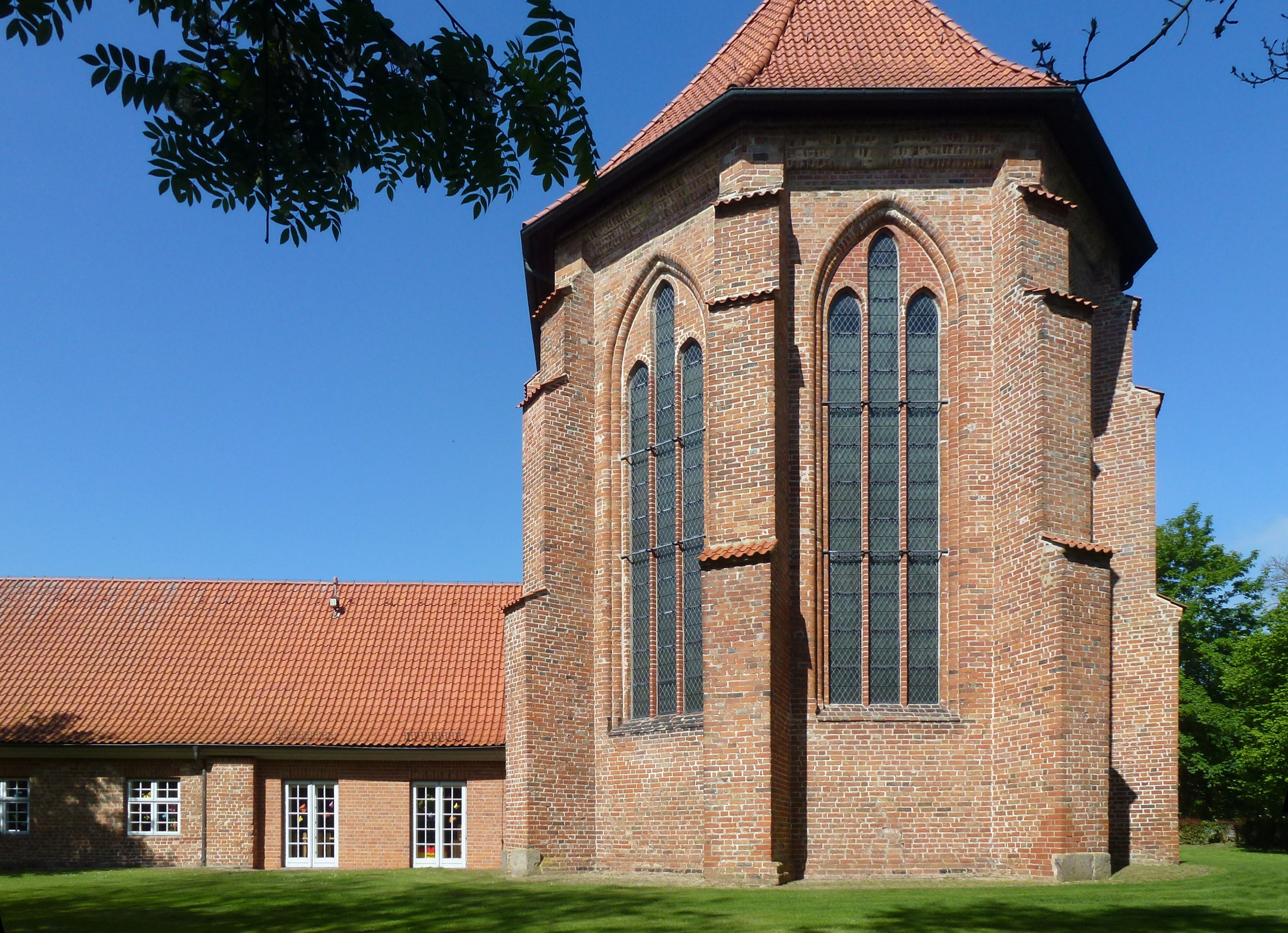 Kloster Cismar